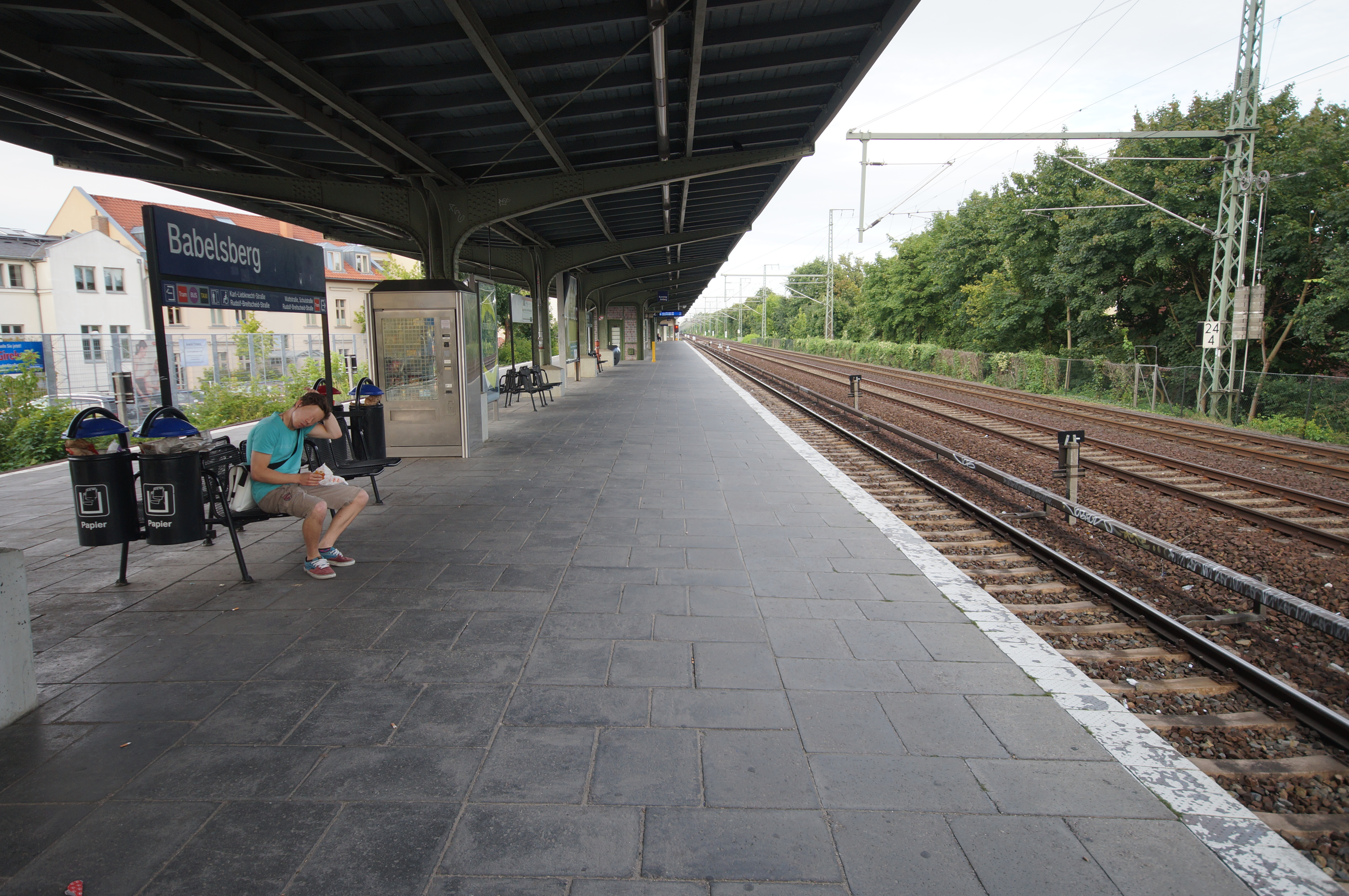 Die Bahnsteige des Bahnhofs Potsdam-Babelsberg